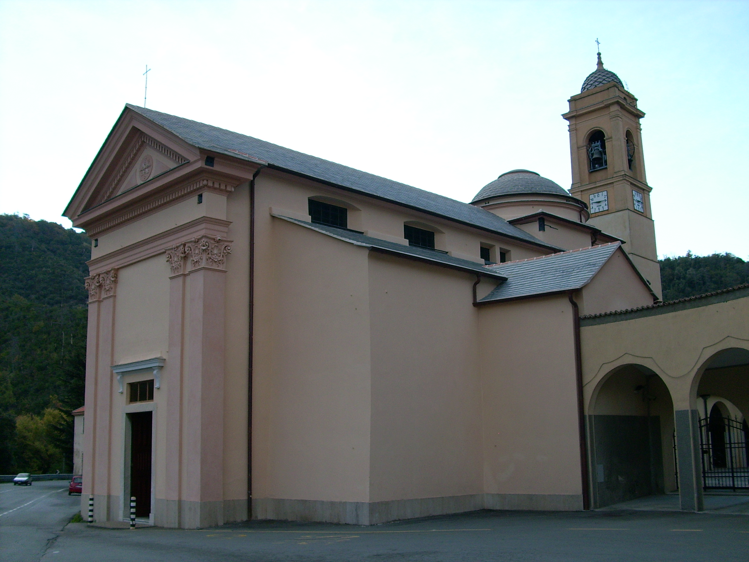 Santuario di Nostra Signora della Pace presso Albisola Superiore, Liguria, Italia